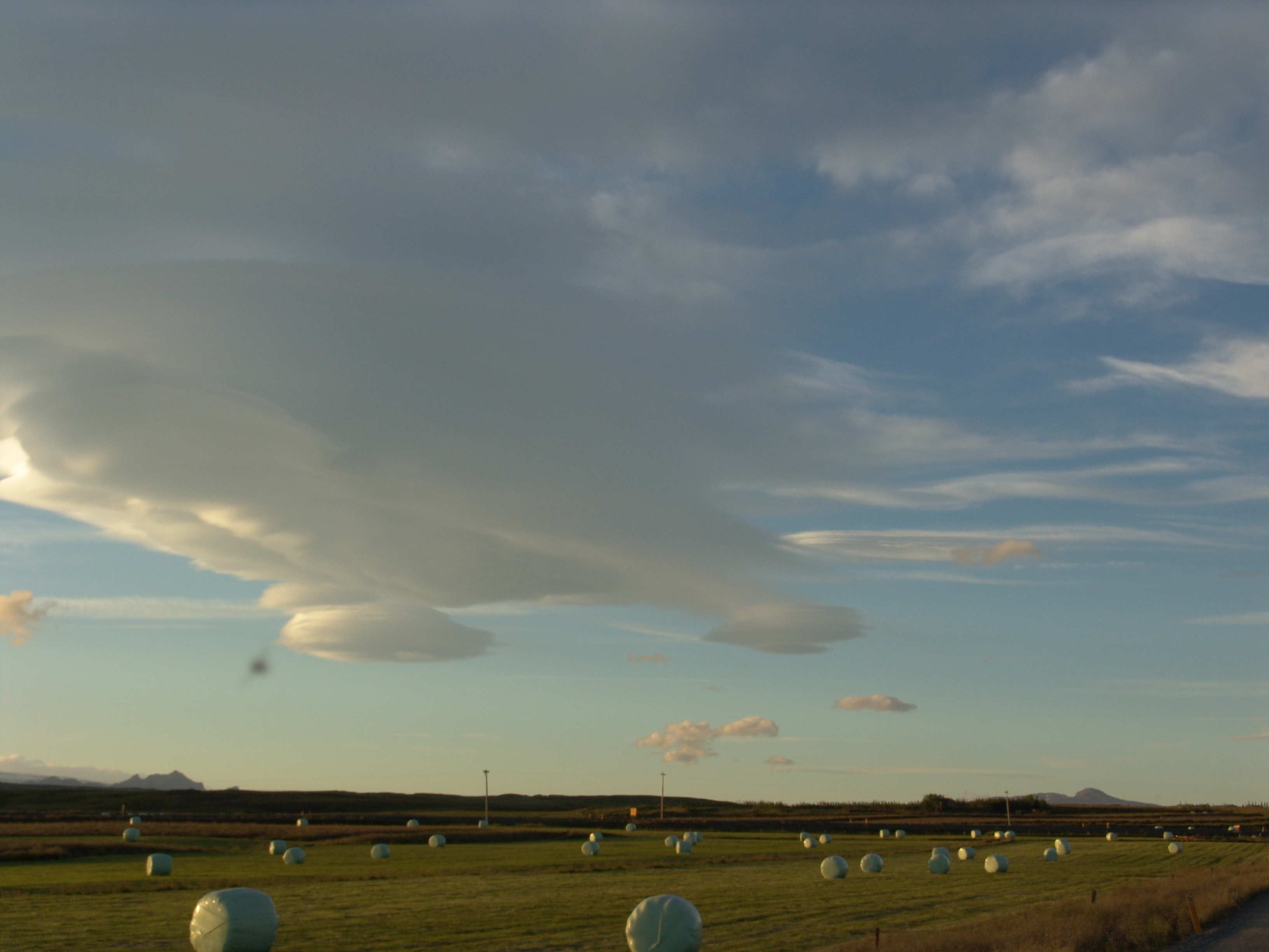 Landschaft mit Silageballen in Island.